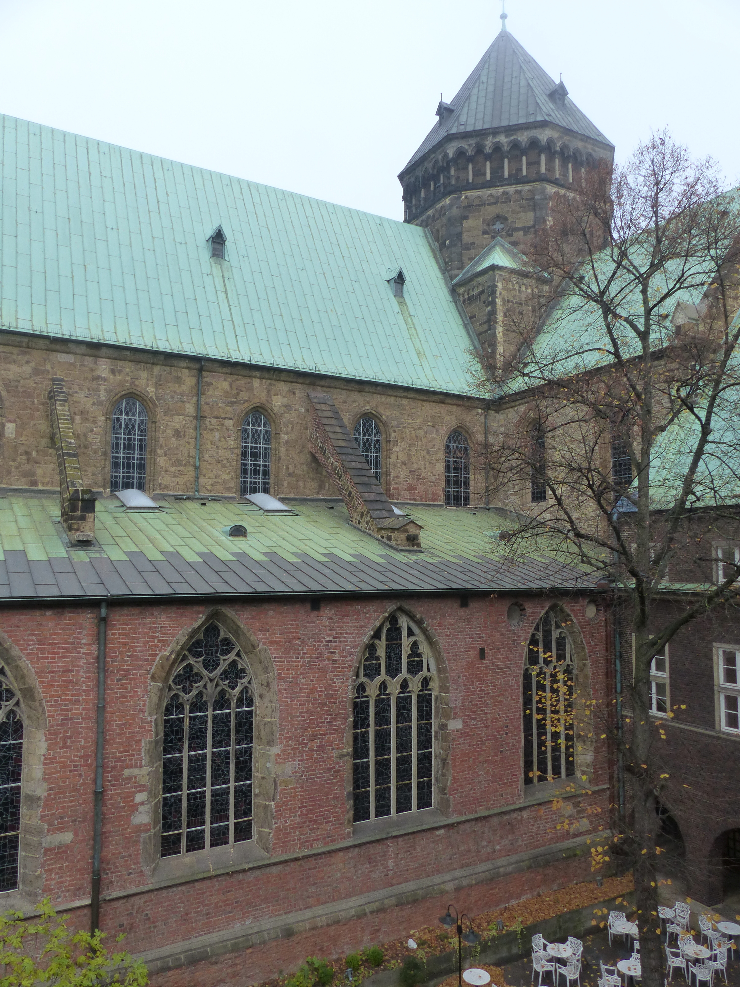 Östliche Joche des Hauptschiffs einschließlich der gotischen Kapellenzeile, Westwand des südlichen Querschiffs, Vierungsturm, gesehen aus dem 2. OG des Gemeindezentrums Kapitel 8 der Domgemeinde